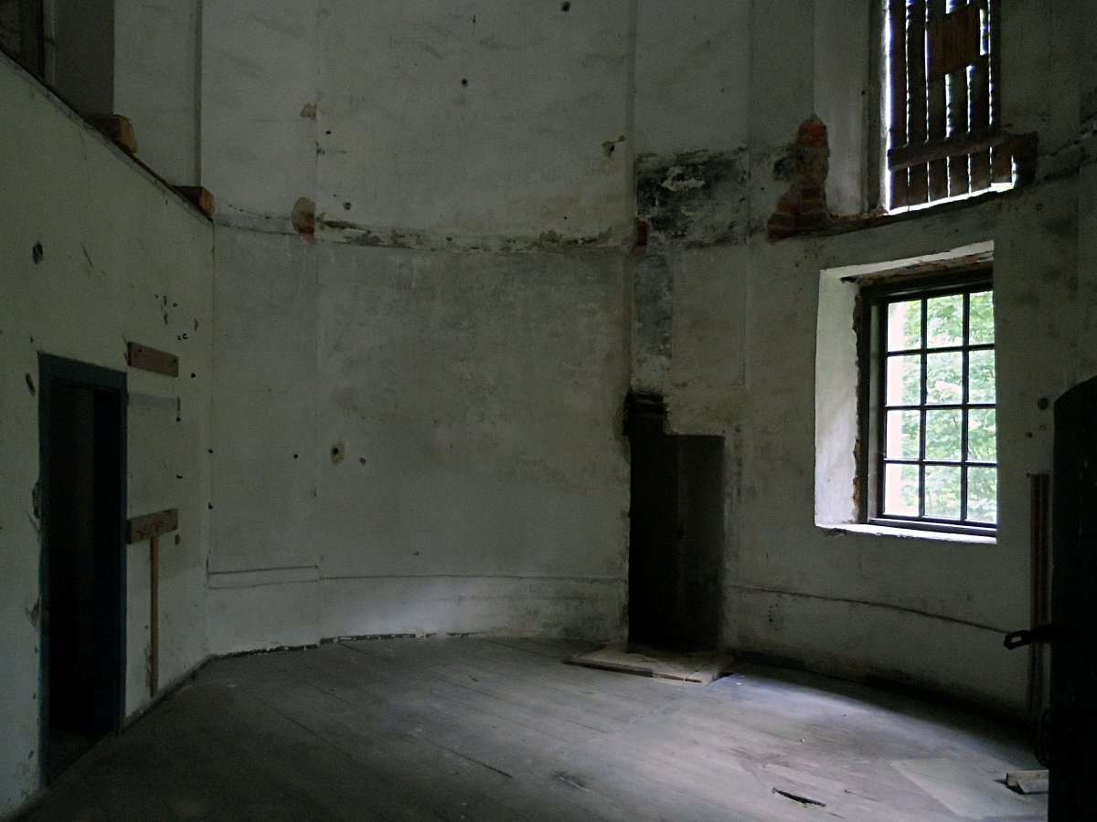 Дубае. Капліца